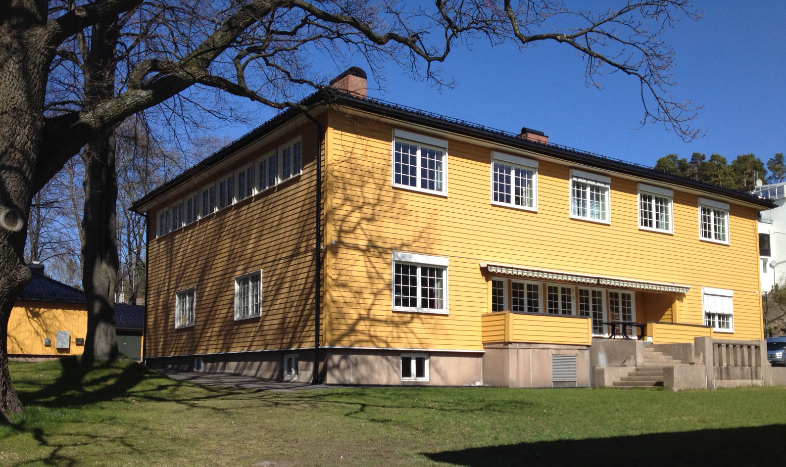 Sollerudstranda skole, Drammensveien 280, Oslo 2014